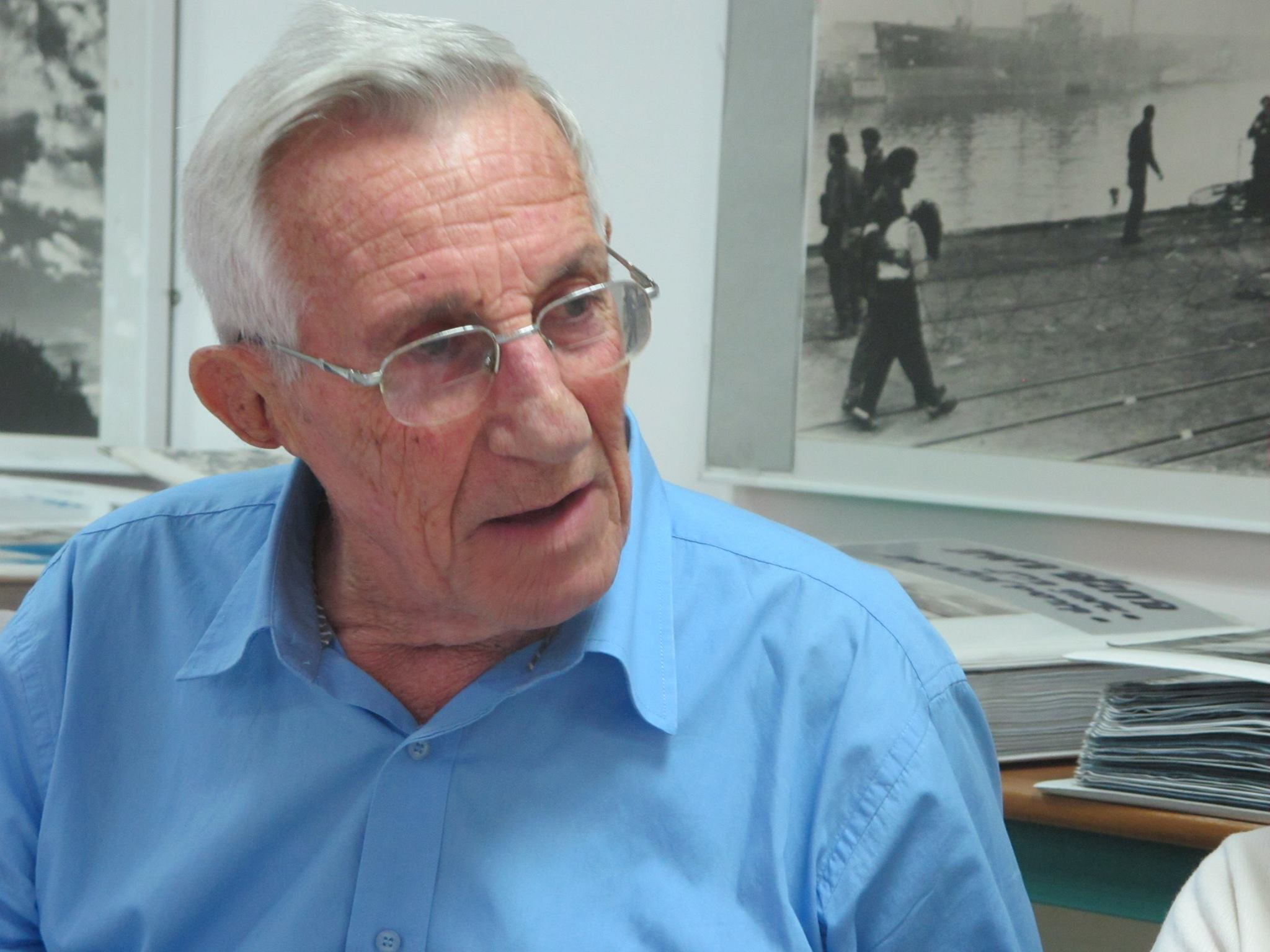 מיכאל (מיקי) כהן